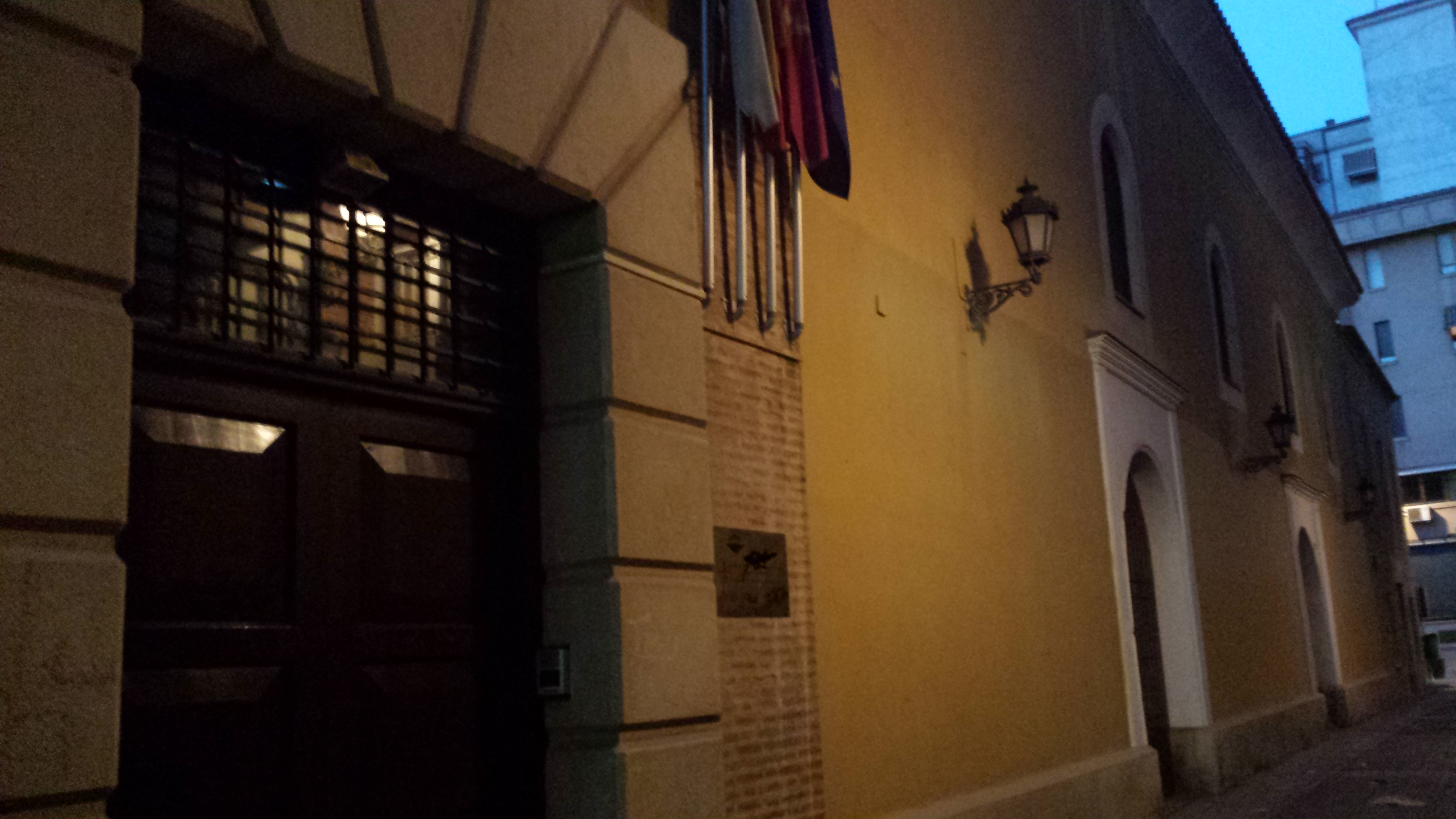 Monasterio de la Encarnación. Convento de la Encarnación. Centro Cultural la Asunción, Instituto de Estudios Albacetenses (IEA). Real Conservatorio Profesional de Música y Danza de Albacete. Albacete.